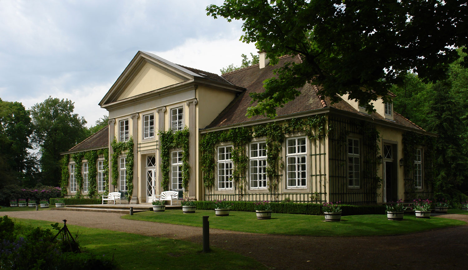 Haus Landruhe, Bremen, Am Rüten 2. Erbaut: um 1795. Architekt: Deetjen, Joachim Andreas Das abgebildete Objekt ist ein geschütztes Kulturdenkmal in der Freien Hansestadt Bremen, mit der Nr. 1212 beim Landesamt für Denkmalpflege registriert.